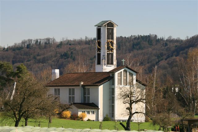 röm.-kath. Kirche Untersiggenthal AG, Schweiz